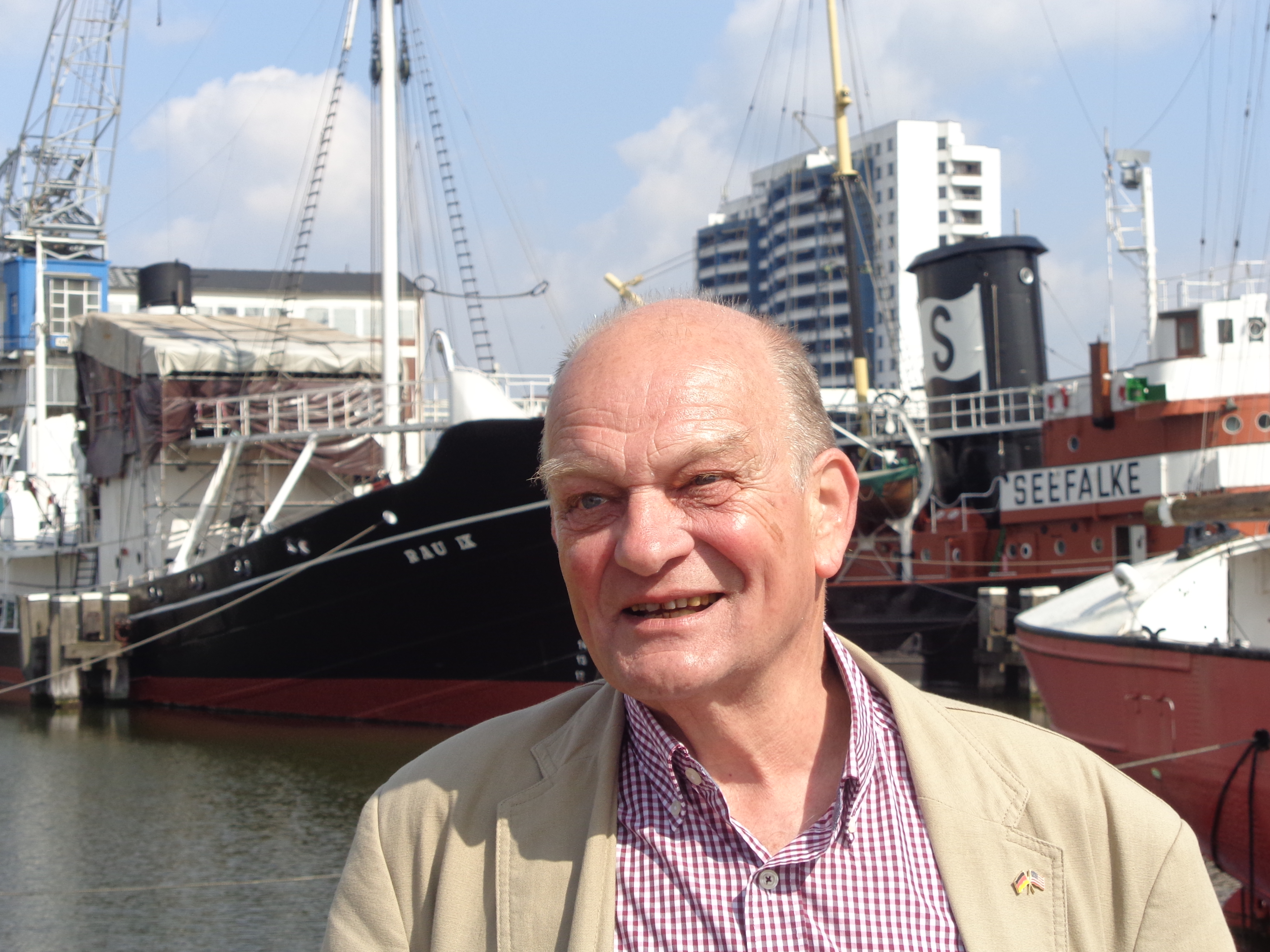 Peter Raap im Alten Hafen, Bremerhaven